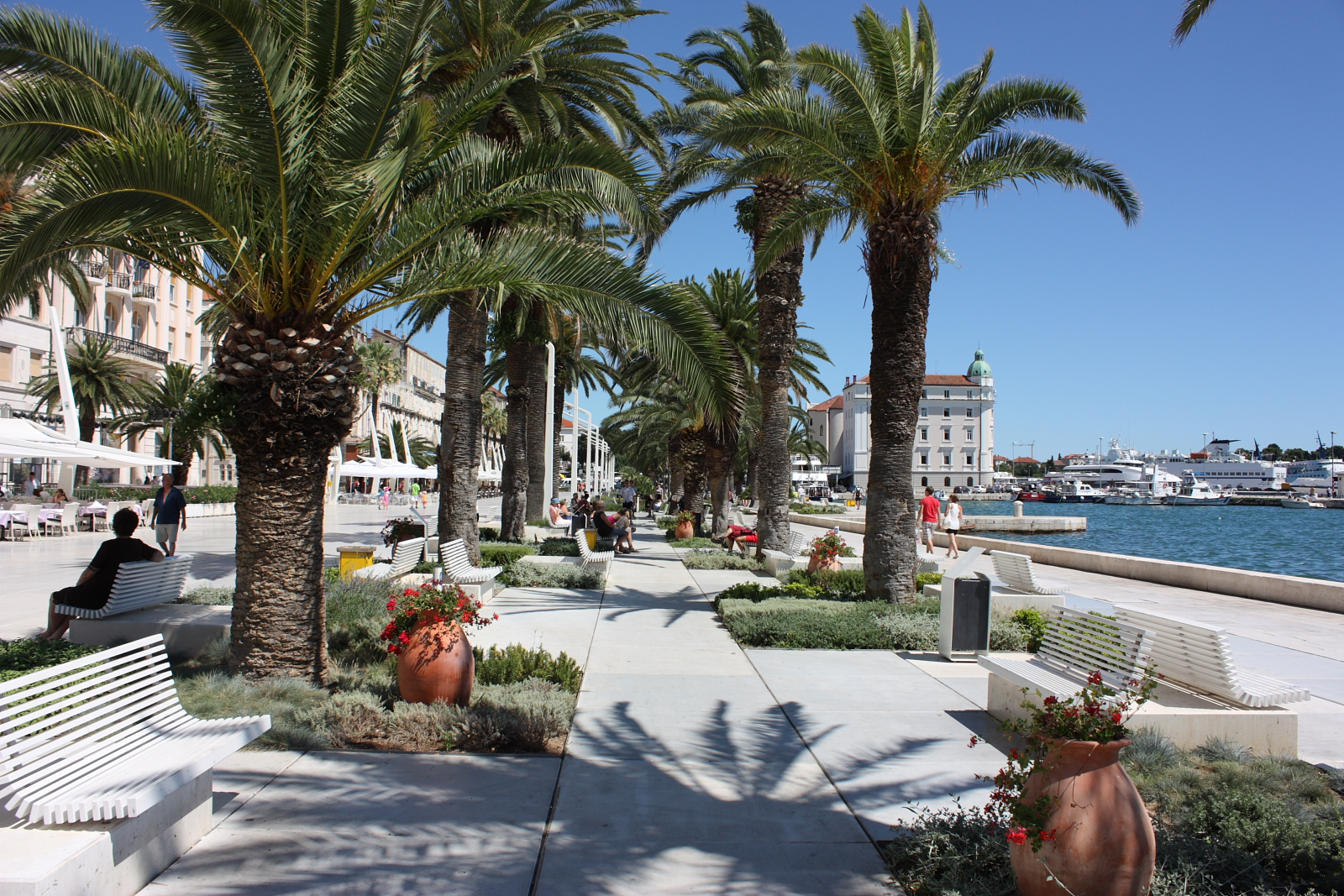 Split